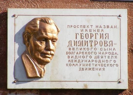 Мемориальная доска на доме № 33 по проспекту Димитрова в городе Могилеве, Республика Беларусь